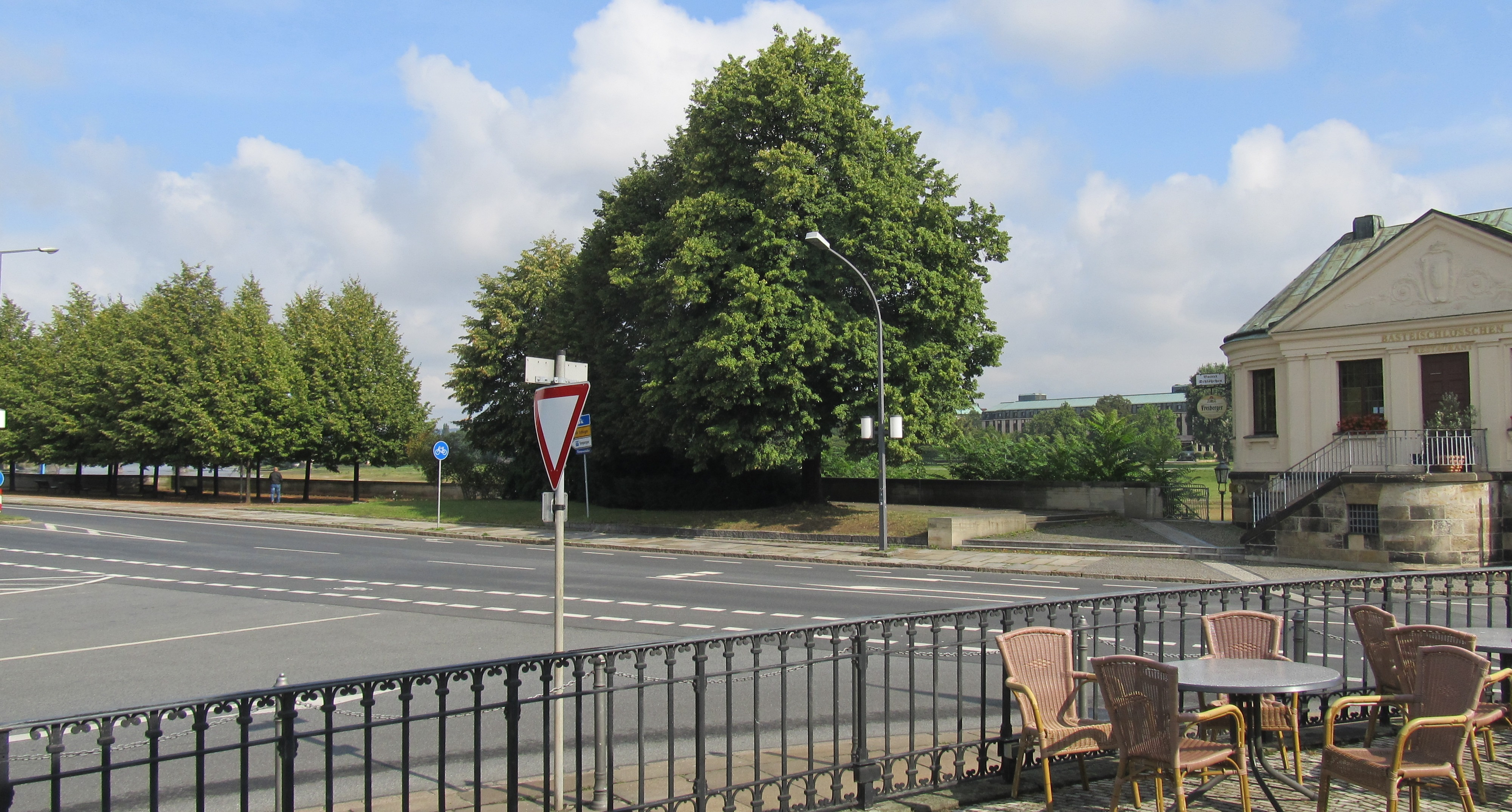 Ehemaliger Standort der Calberlaschen Zuckersiederei, nachmals Hotel Bellevue, am Terrassenufer in Dresden